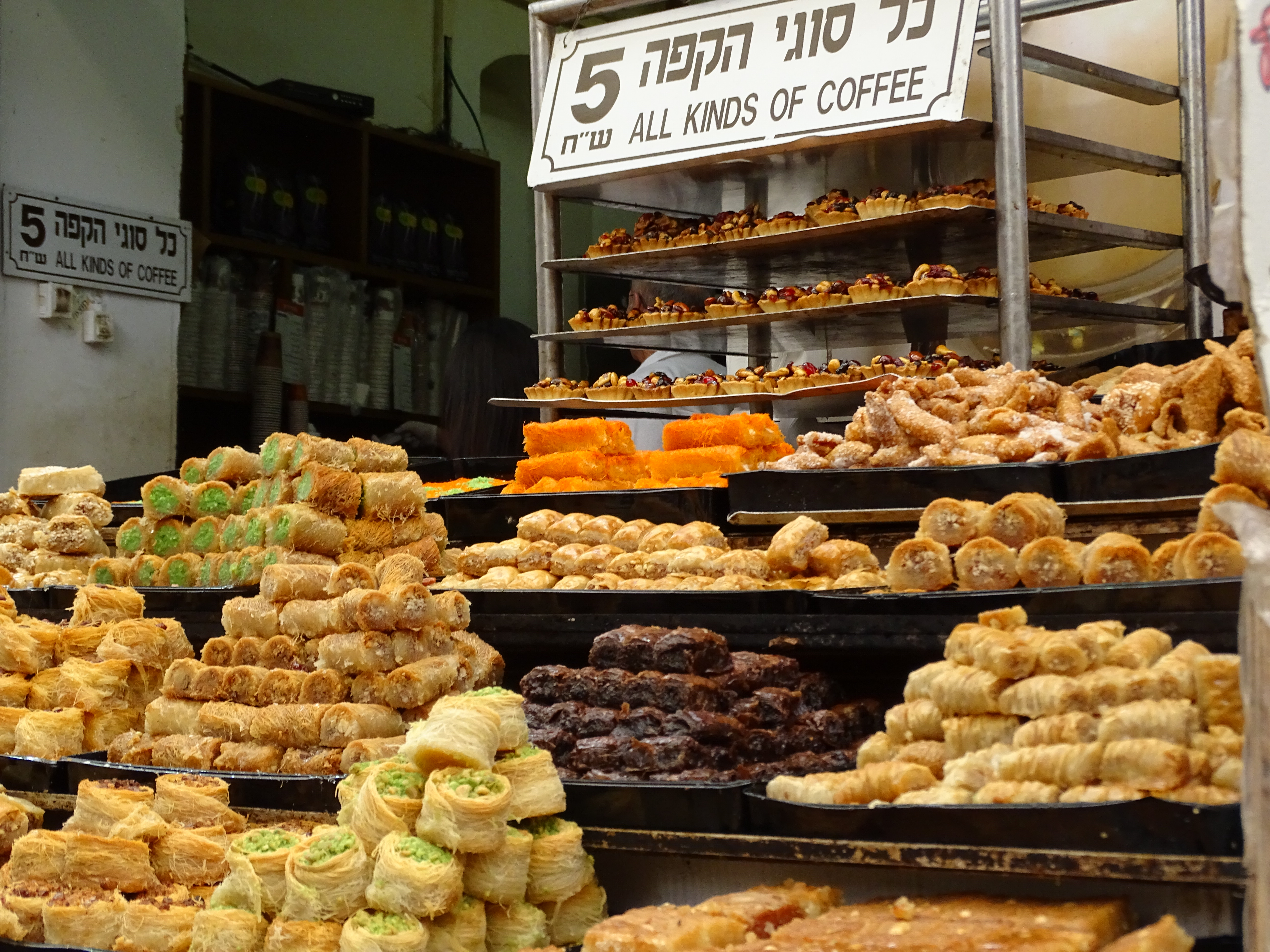 Mahane Yehuda Market, Jerusalem, Angebote (Süßigkeiten)